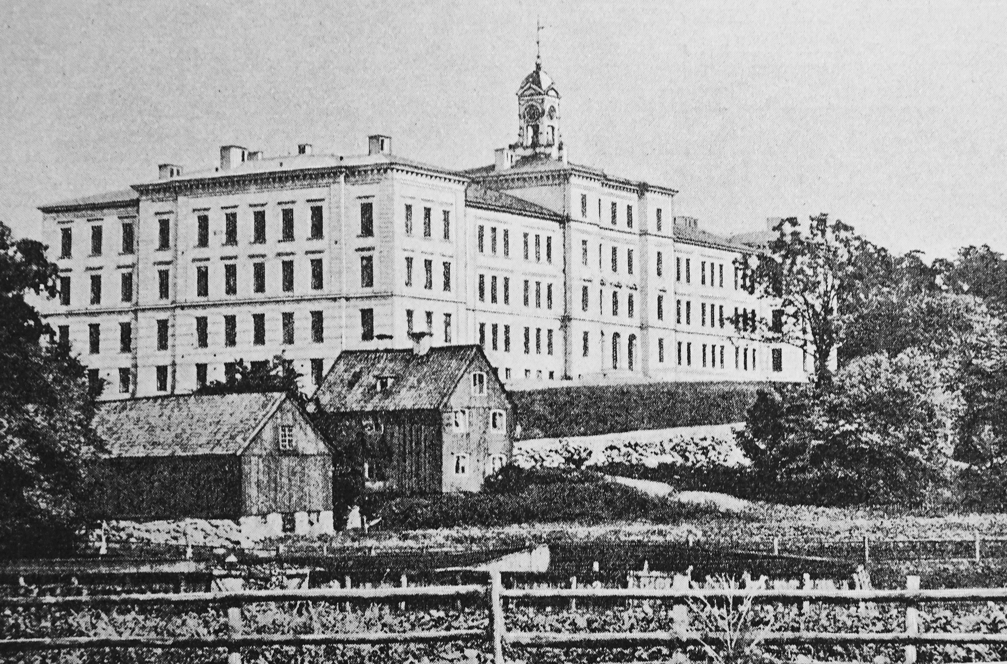 Tomtebodaskolans huvudbyggnad